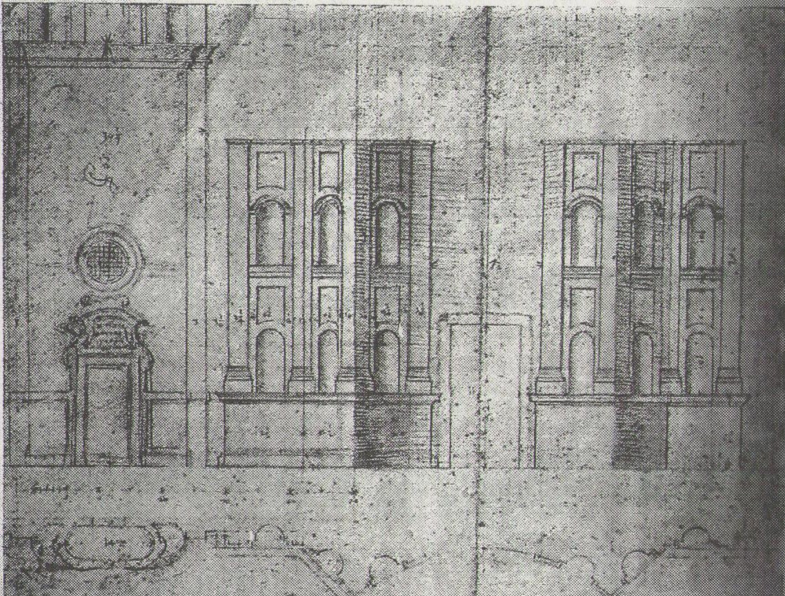 Borrominis Entwurf für die Fassadengestaltung von Santa Maria dei Sette dolori in Rom